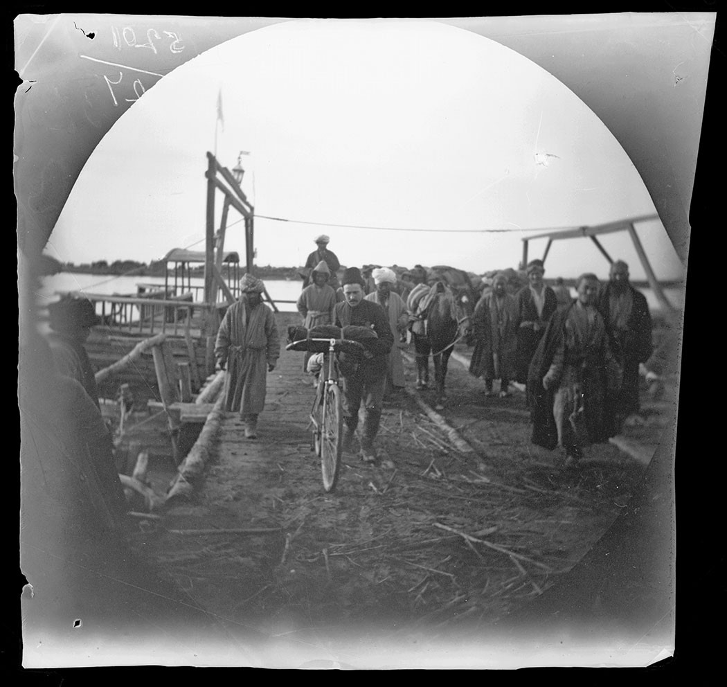 1891. Снимки Туркестана из альбома кругосветного путешествия на велосипедах Томаса Аллена